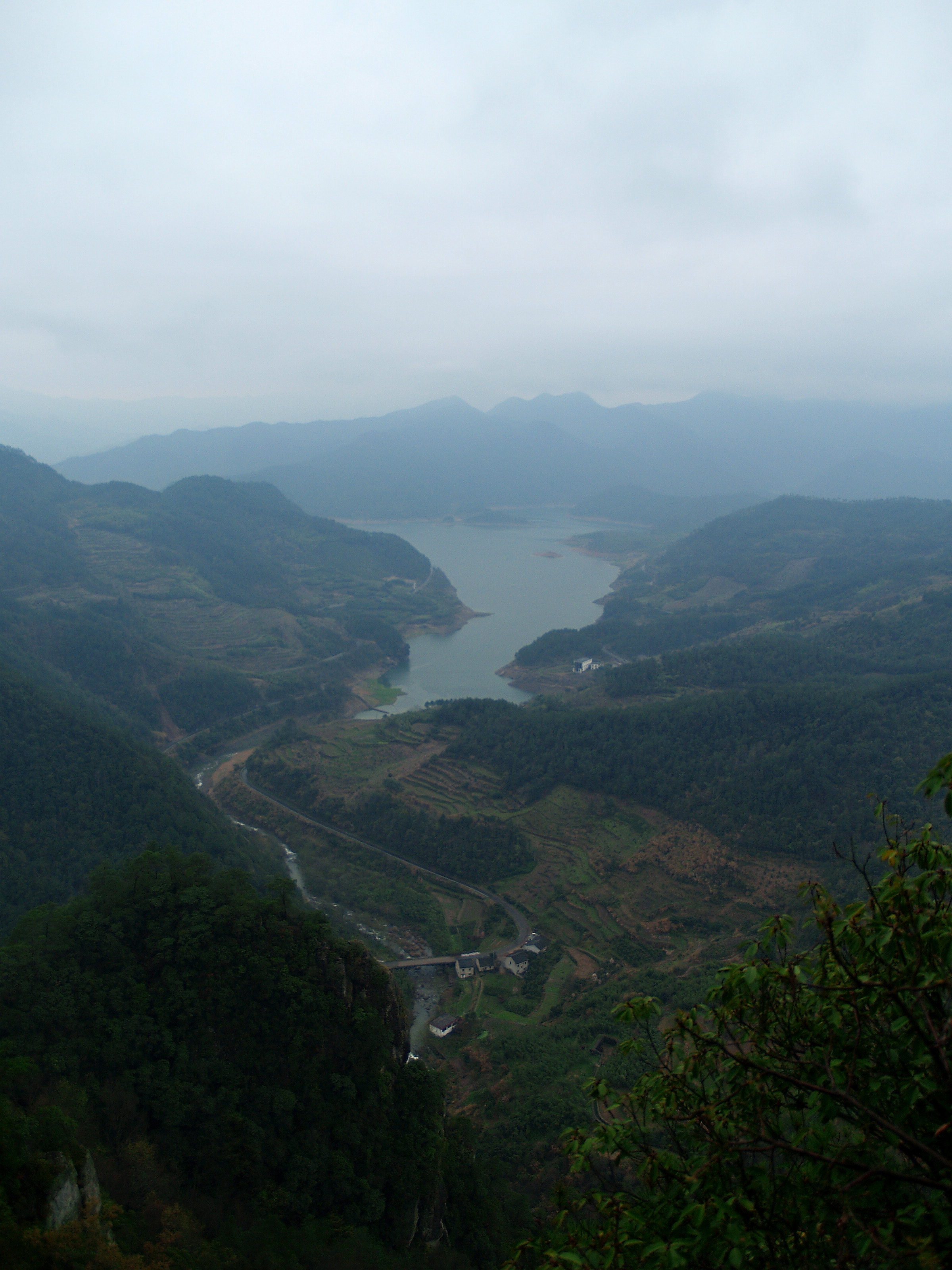 亭下水库鸟瞰